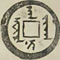 天聪汗钱正面拓印